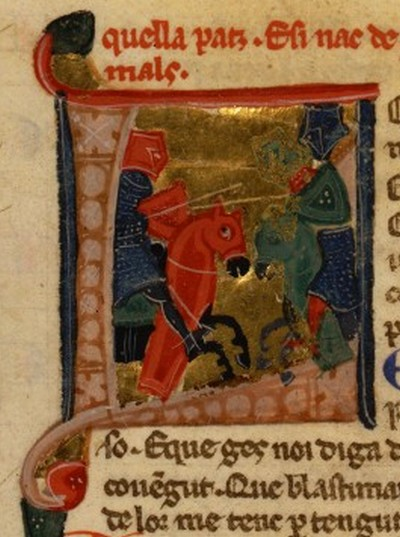 Bertrand de Born combattant